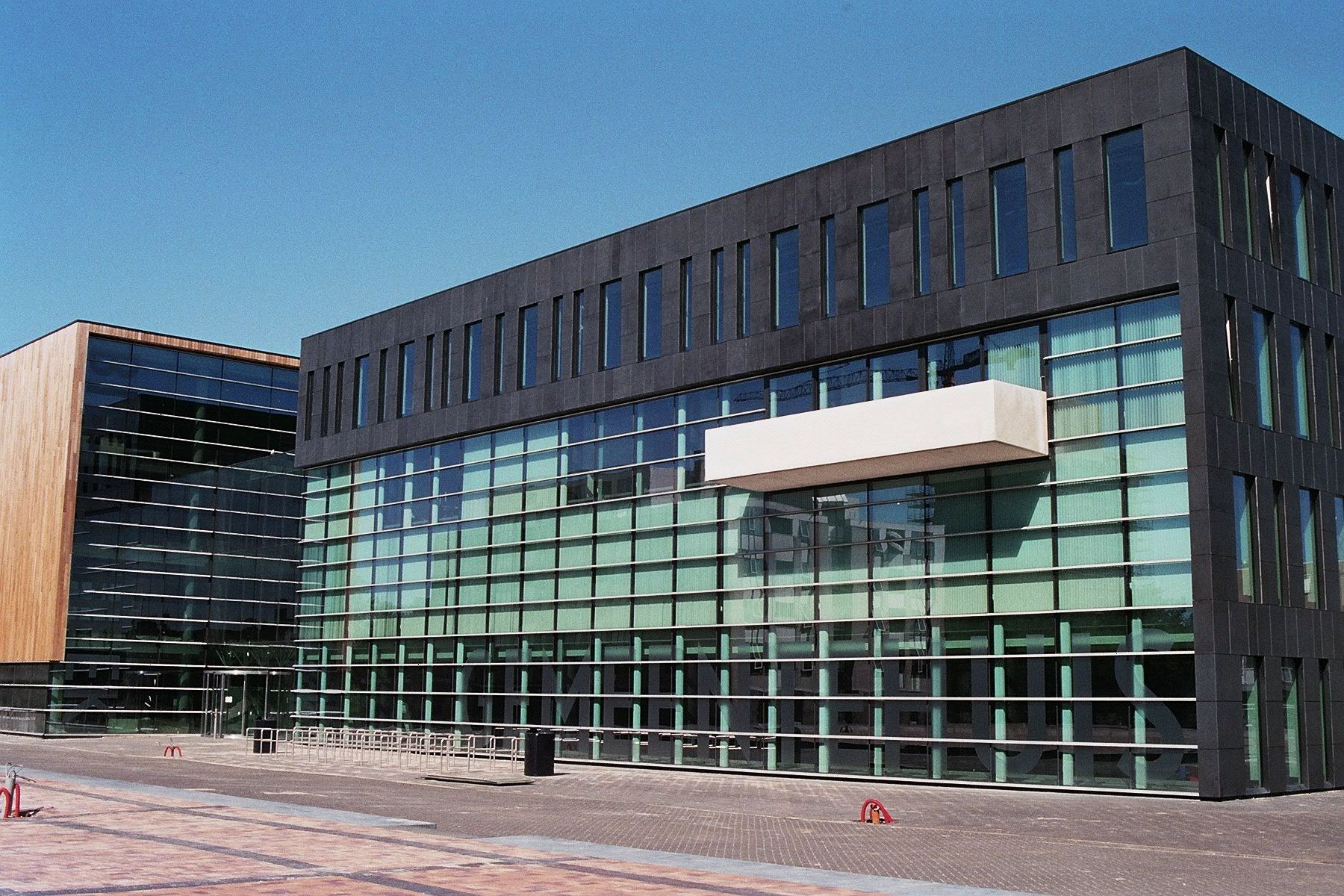 Town hall Heerhugowaard, part built in 2006